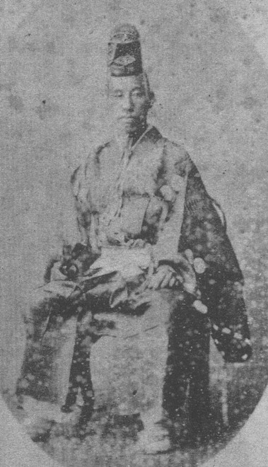 伊達宗城 Date Munenari.